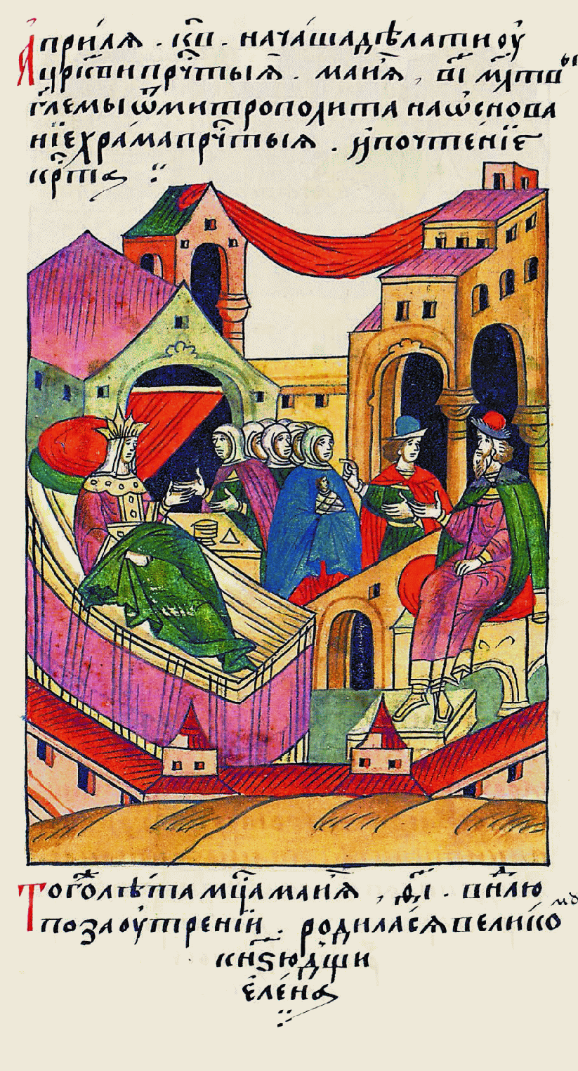 В том же году в мае в 19 день в воскресенье после заутрени роди- лась великому князю дочь Елена.